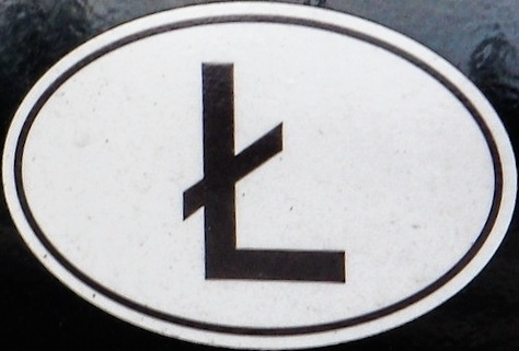 Der Buchstabe Ł als inoffizielles sorbisches Nationalitätszeichen an einem Auto in Bautzen. Hornjoserbsce: Pismik Ł jako inoficielna serbska narodna značka na awće w Budyšinje.